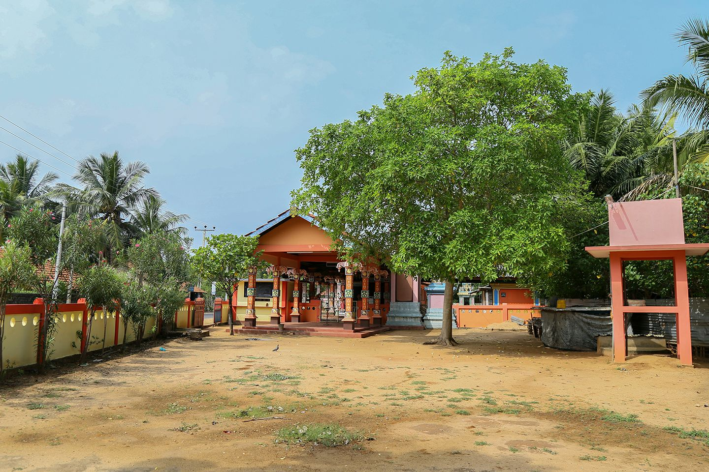 னனாஎஉ